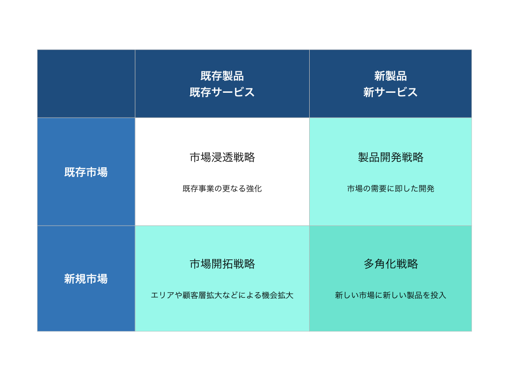 アンゾフの二次元マトリックスを図示したものです。